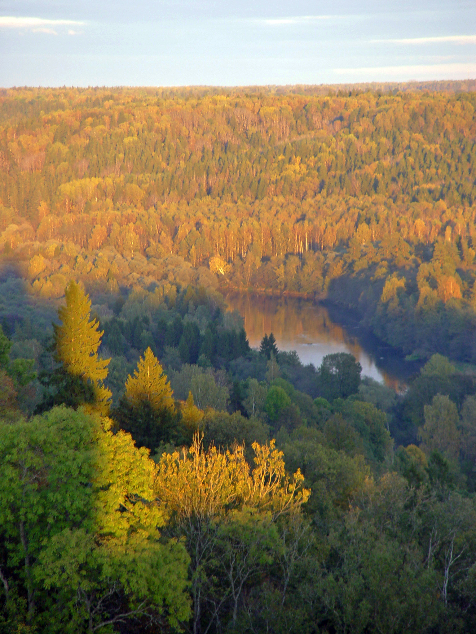 Gauja River valley in Sigulda, Gauja National Park, Latvia